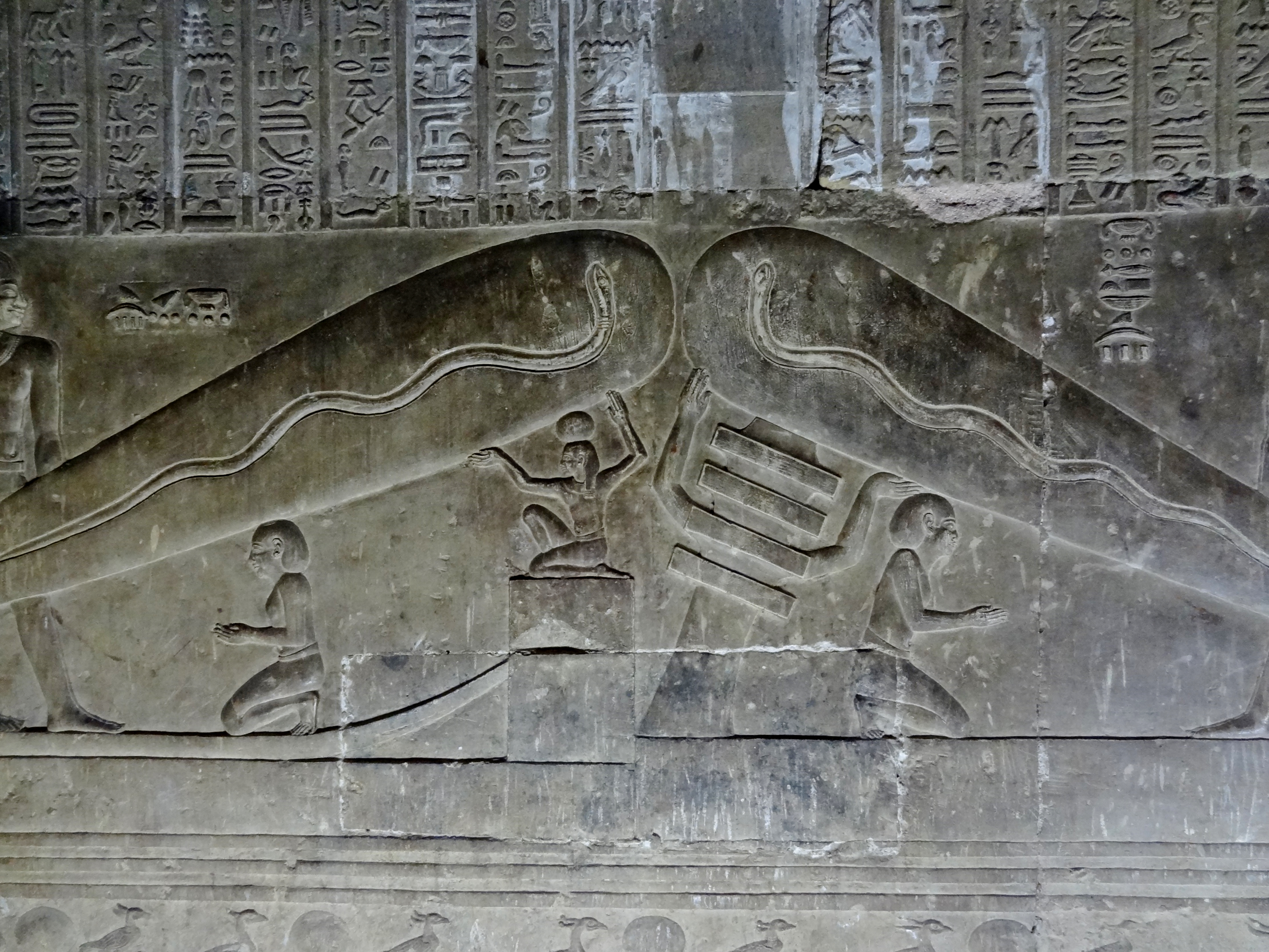 Krypta des Hathor-Tempels von Dendera, Ägypten